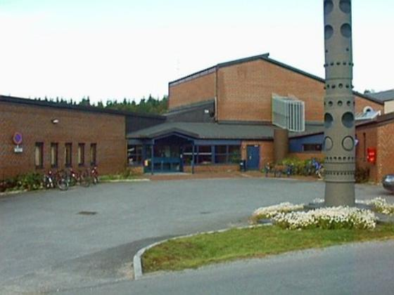 Musikkonservatoret i Tromsø